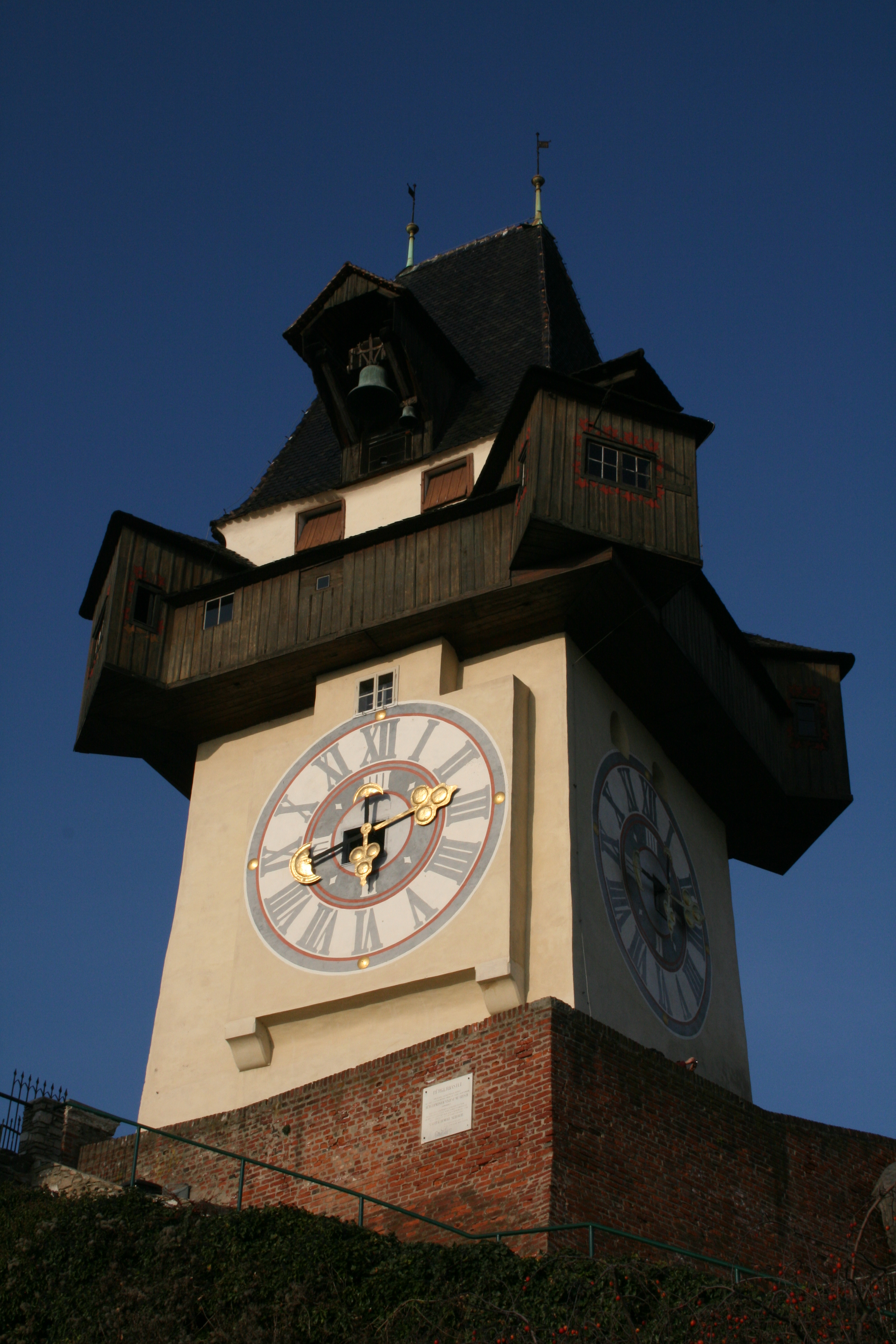 Graz, Austria: Uhrturm am Schlossberg